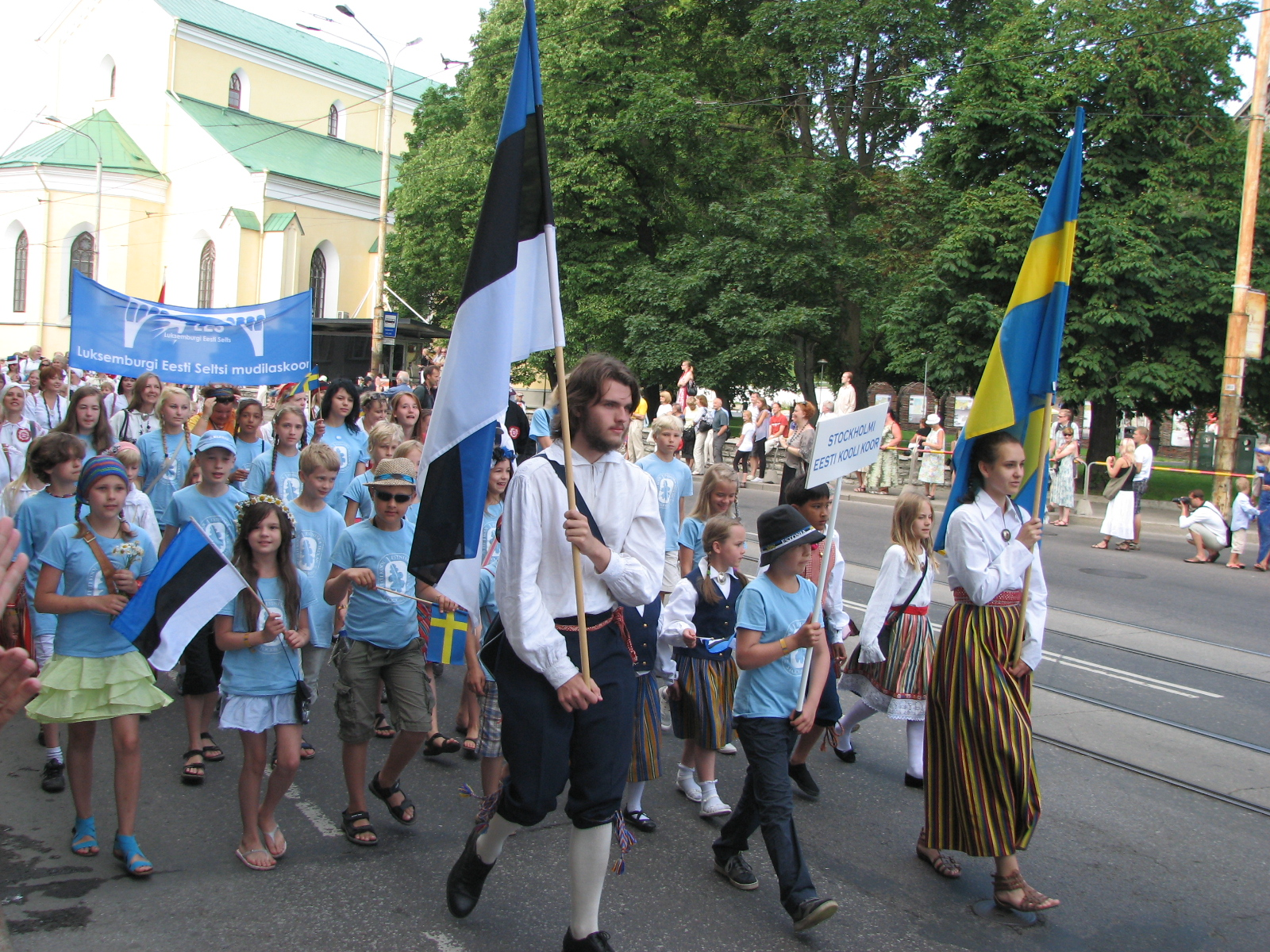 Stockholmi Eesti Kooli koor XI noorte laulu- ja tantsupeo rongkäigus